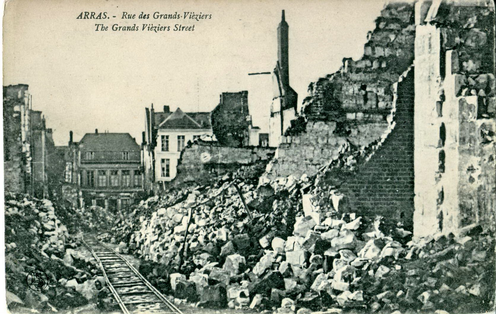 Carte postale ancienne éditée par LaffineurARRAS : la rue des Grands-Viéziers (démolitions de la Premère guerre mondiale. On distingue une voie ferrée de campagne, type Decauville, pour permettre les déblais